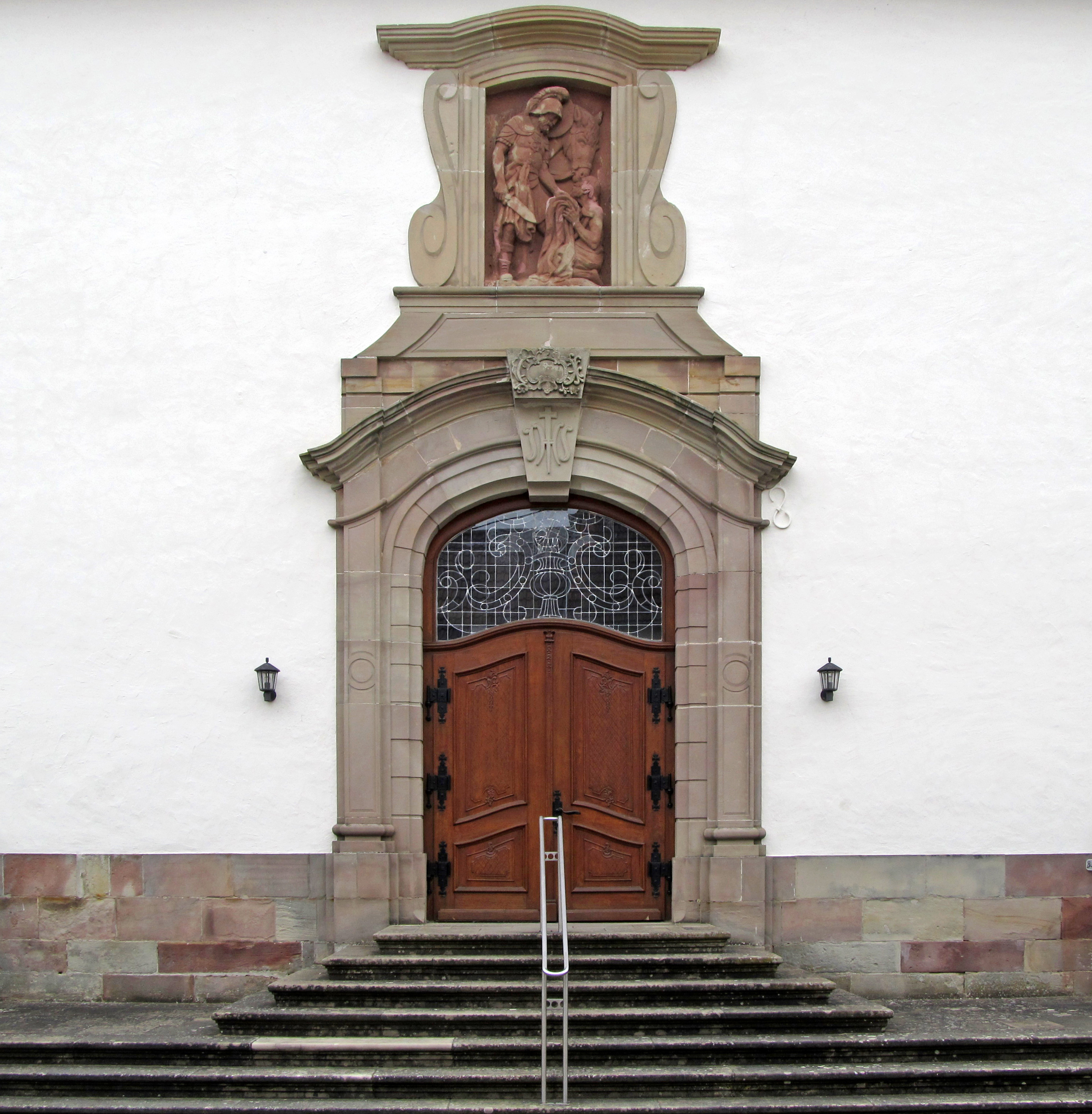 Eingangsportal der katholischen Pfarrkirche St. Martin in Habkirchen, Gemeinde Mandelbachtal, Saarland